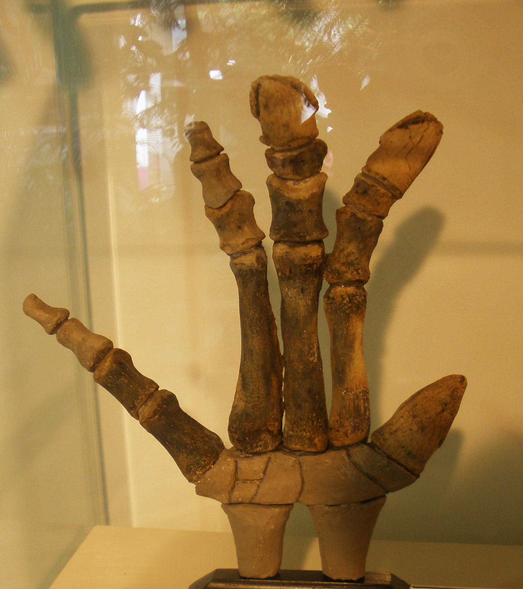 fossil Probactrosaurus